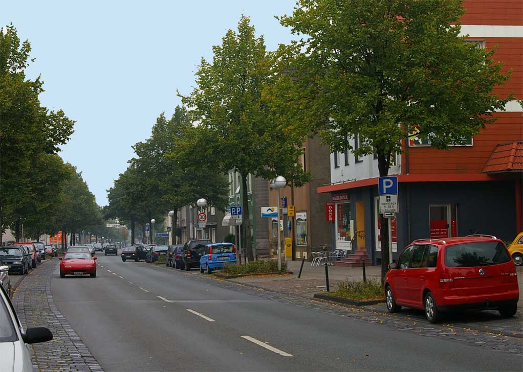 Hoerder Strasse in Witten-Stockum